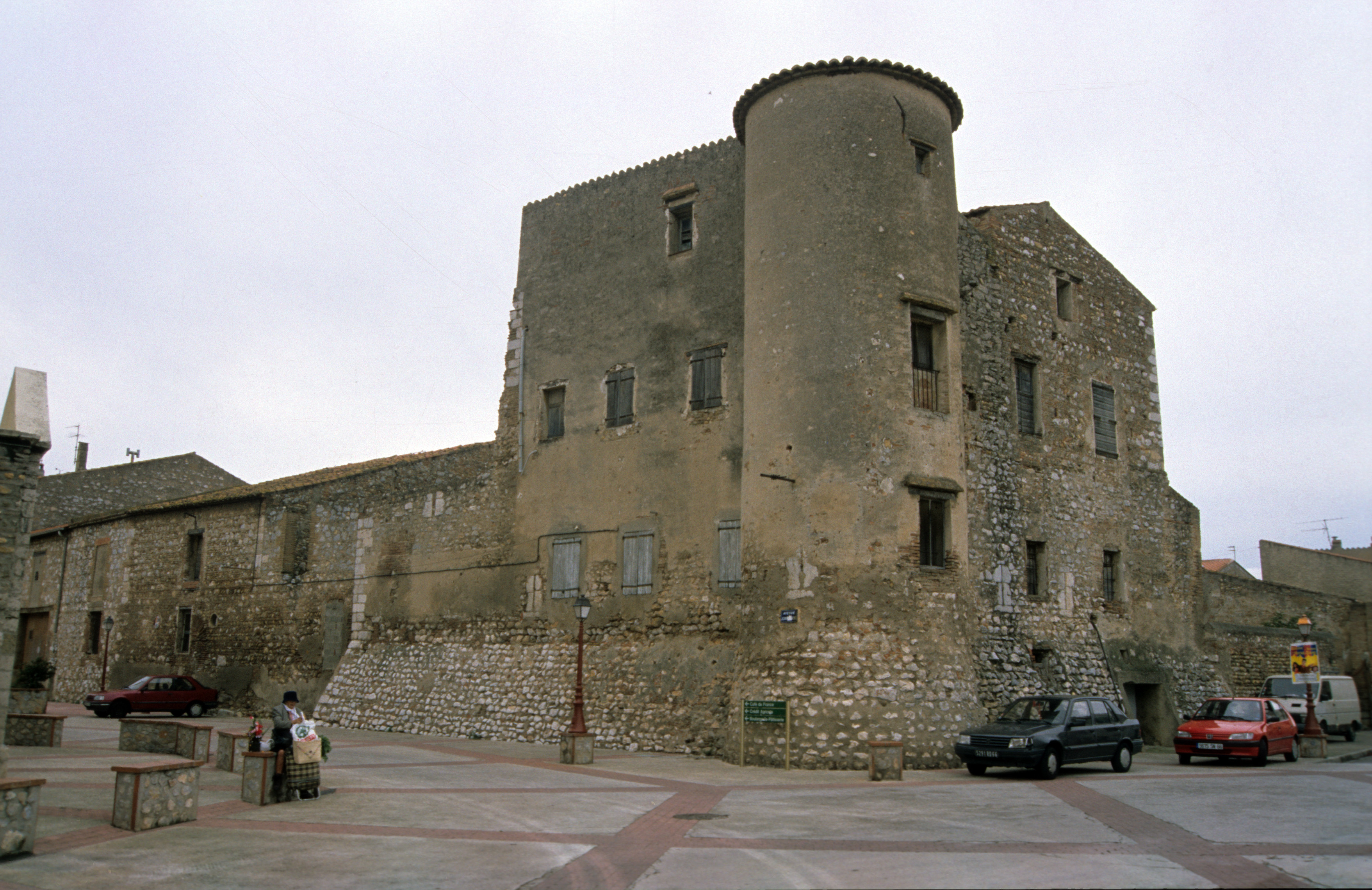 Sant Hipòlit de la Salanca (Rosselló). Castell templer. Any 2007.